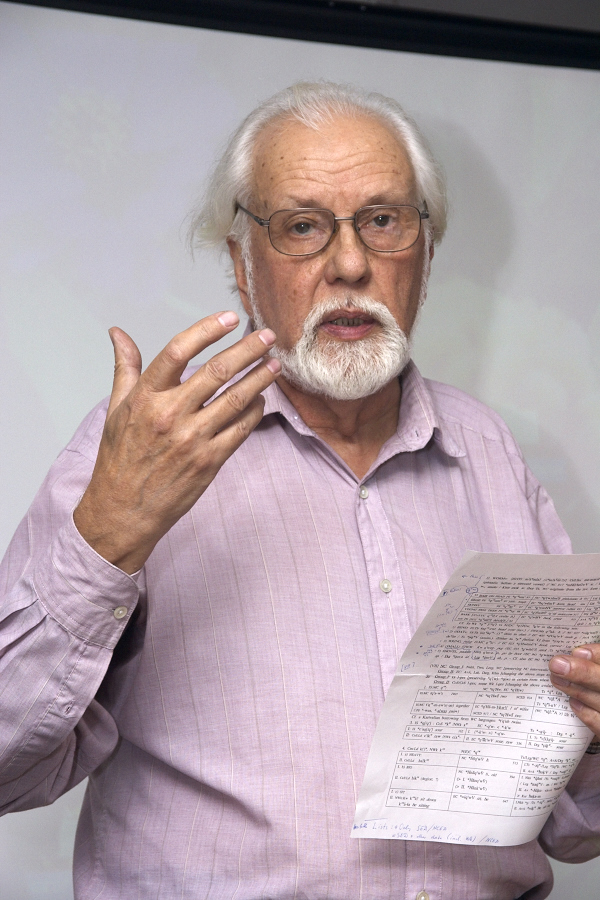 Виталий Викторович Шеворошкин на Конференции памяти В. М. Иллич-Свитыча 21-23.10.2004.